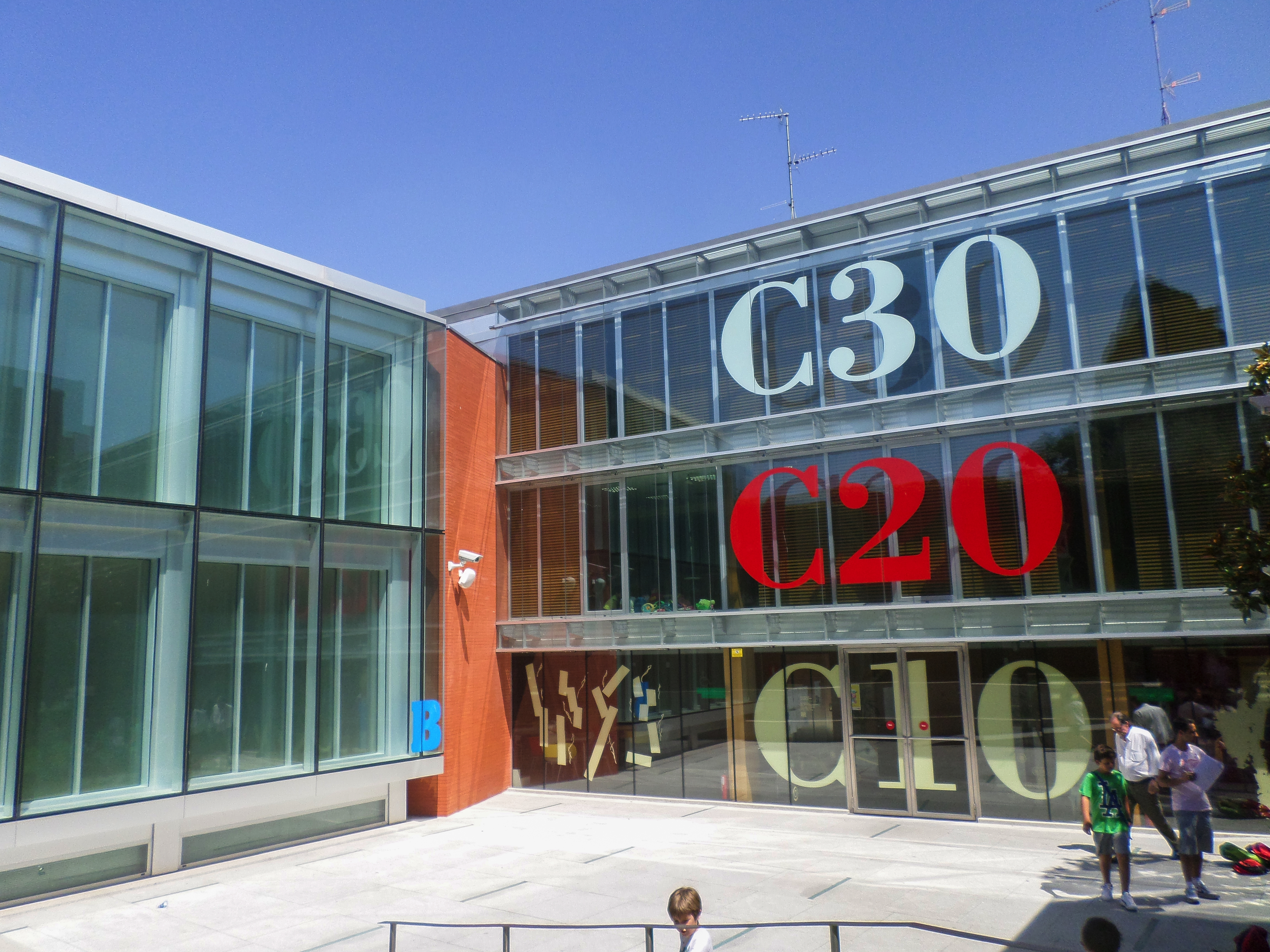 Portada al Centro Internacional de Tecnologías Avanzadas para el Medio Rural, gestionado por el Exmo. Ayuntamiento de Peñaranda de Bracamonte y la Fundación Germán Sánchez Ruipérez. Edificio inaugurado en 2006 obra de los arquitectos Juan Miguel Hernández León y Álvaro Siza.